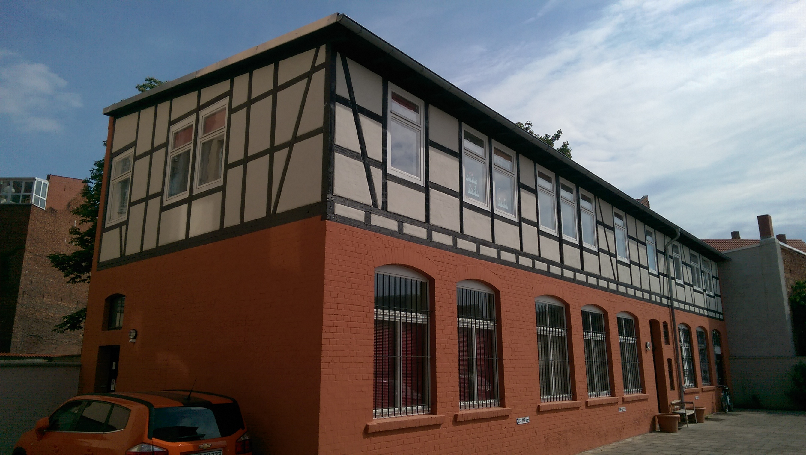 Magdeburger Allee 136 in Erfurt